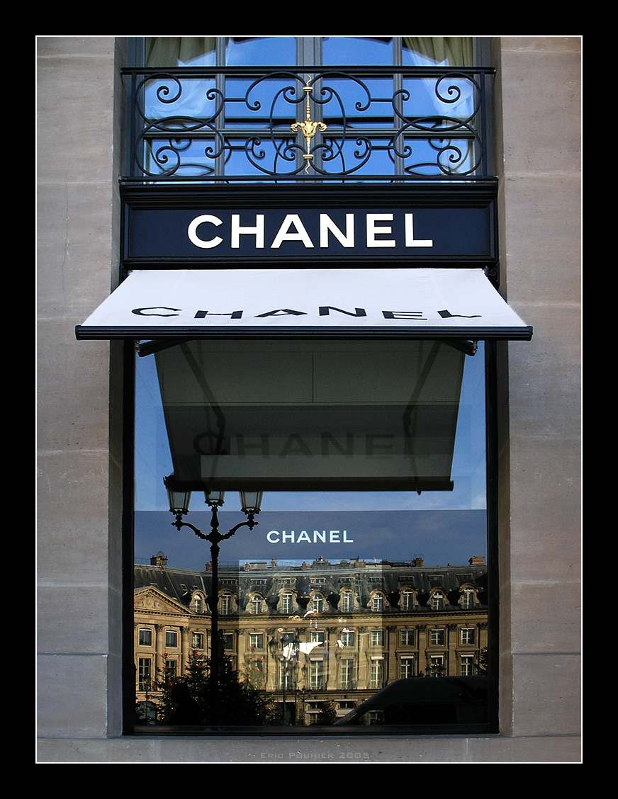 Boutique Chanel Joaillerie, 18, place Vendôme, Paris